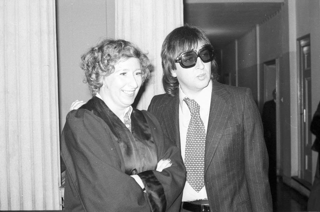 zum zweiten Mal vor dem Landgericht Kiel. Es soll nun endgültig geklärt werden, ob der Musiker, der mit vollem Namen John Leslie Humphries heißt, von der gefährlichen Körperverletztung an einem Zuschauer bei einem Auftritt vor vier Jahren in der Ostseehalle freigesprochen werden kann. Im Bild links die Hamburger Rechtsanwältin und Leiterin der Rechtsabteilung des Springer-Verlages Renate Damm.